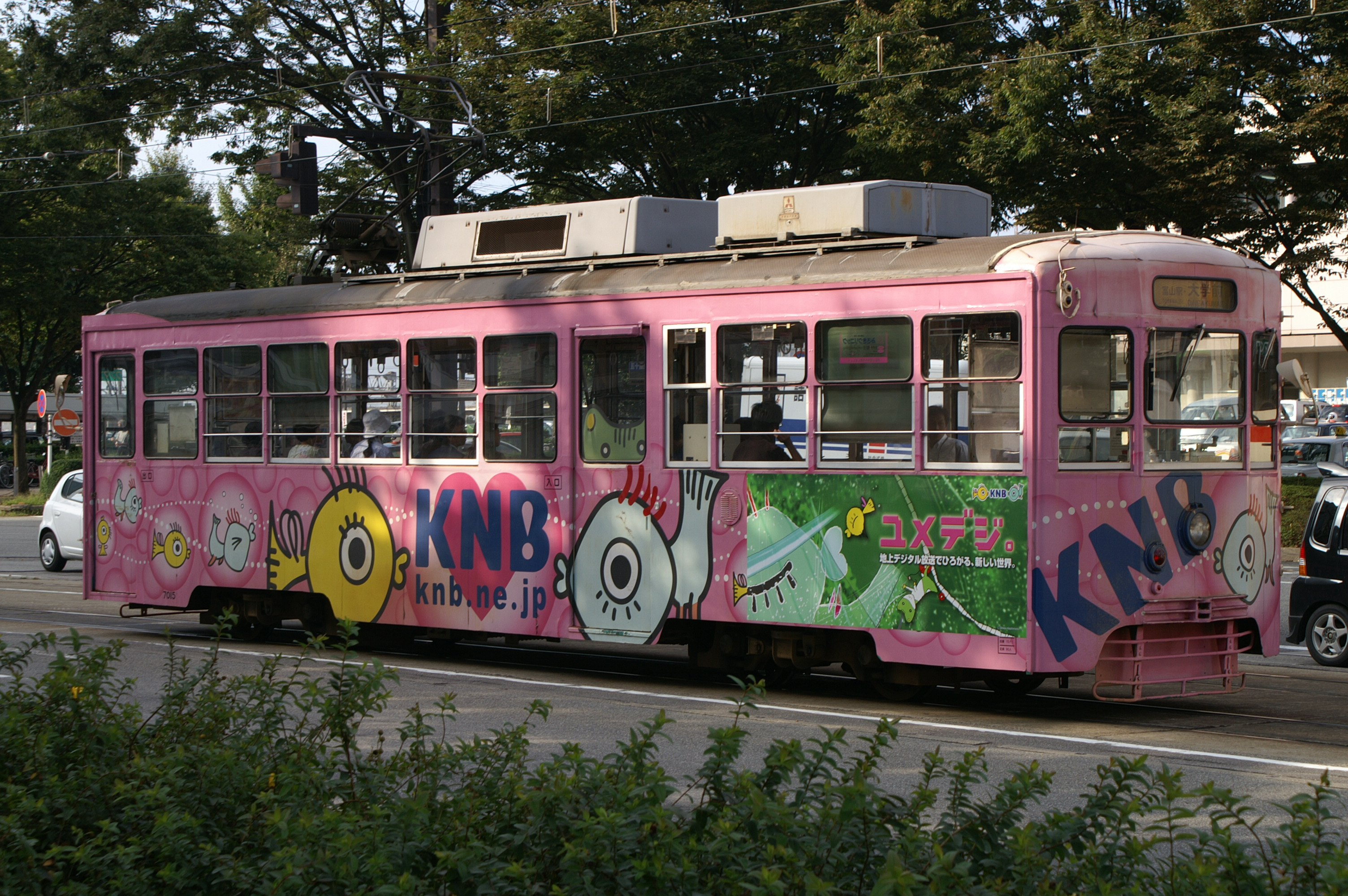 富山地方鉄道7000形の北日本放送全面広告車、車両番号は7015。